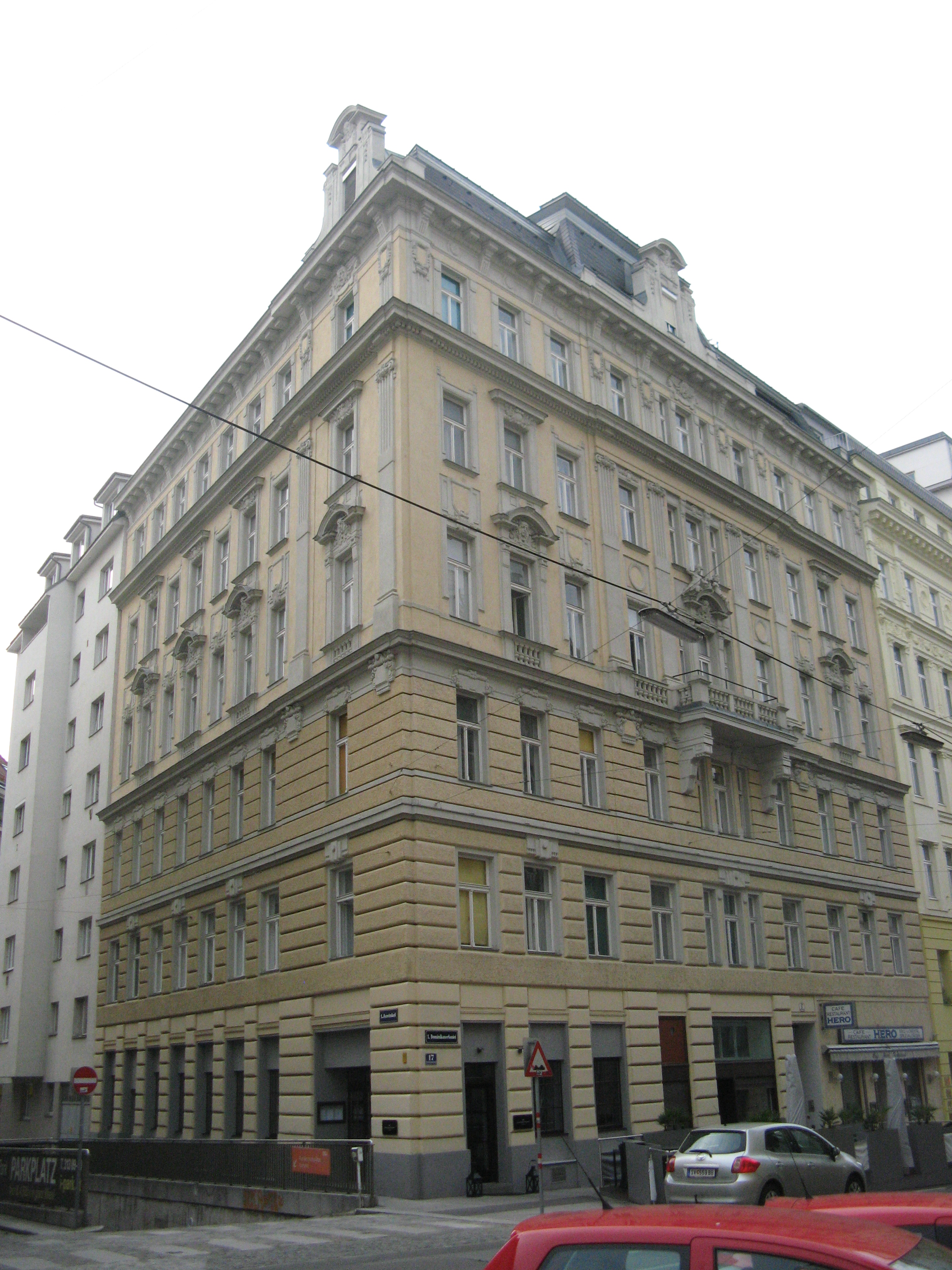 Dominikanerbastei Nr. 17 (1899) von Ludwig A. Fuchsik, Wien-Innere Stadt